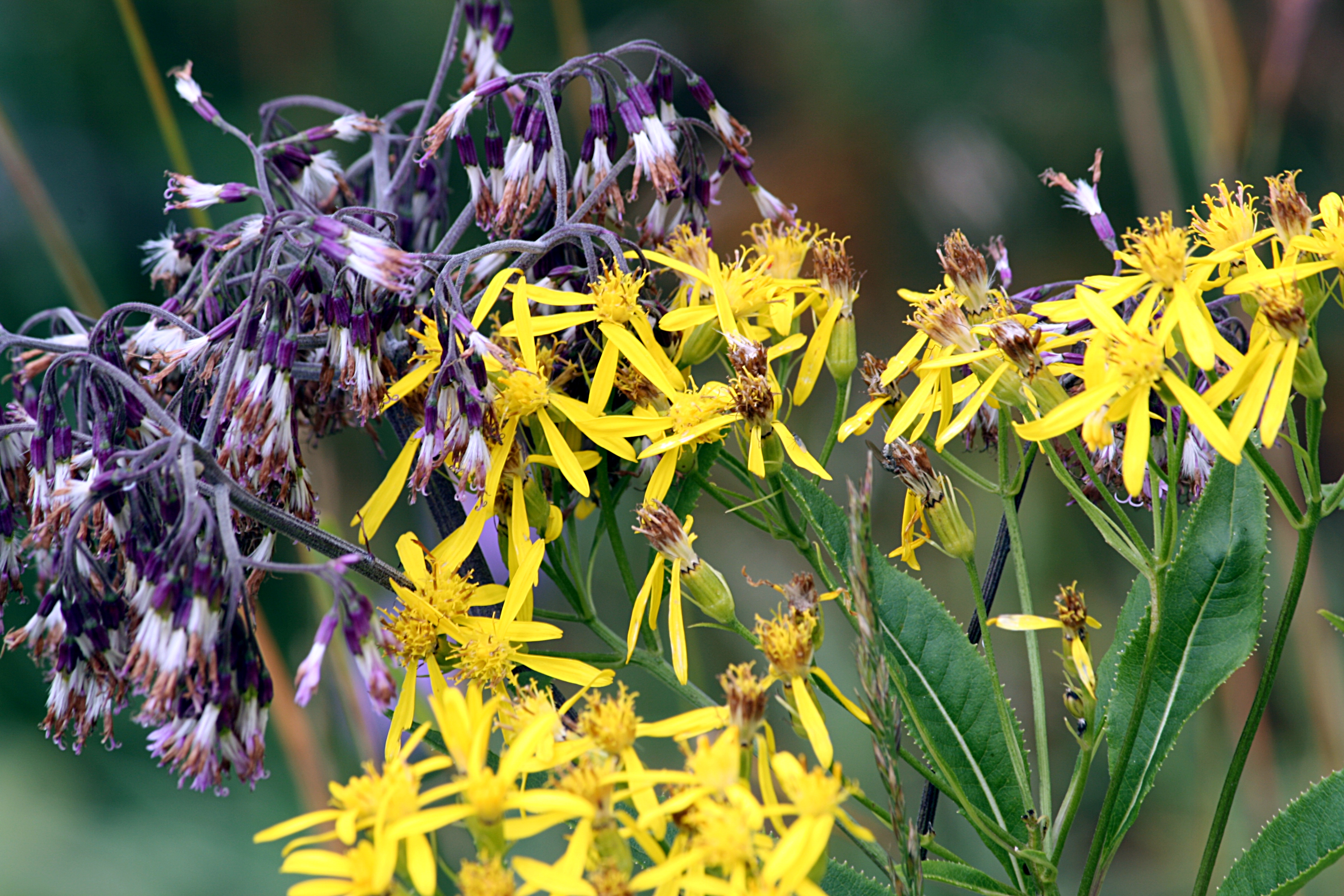 Tegelberg, Senecio nemorensis s.l.